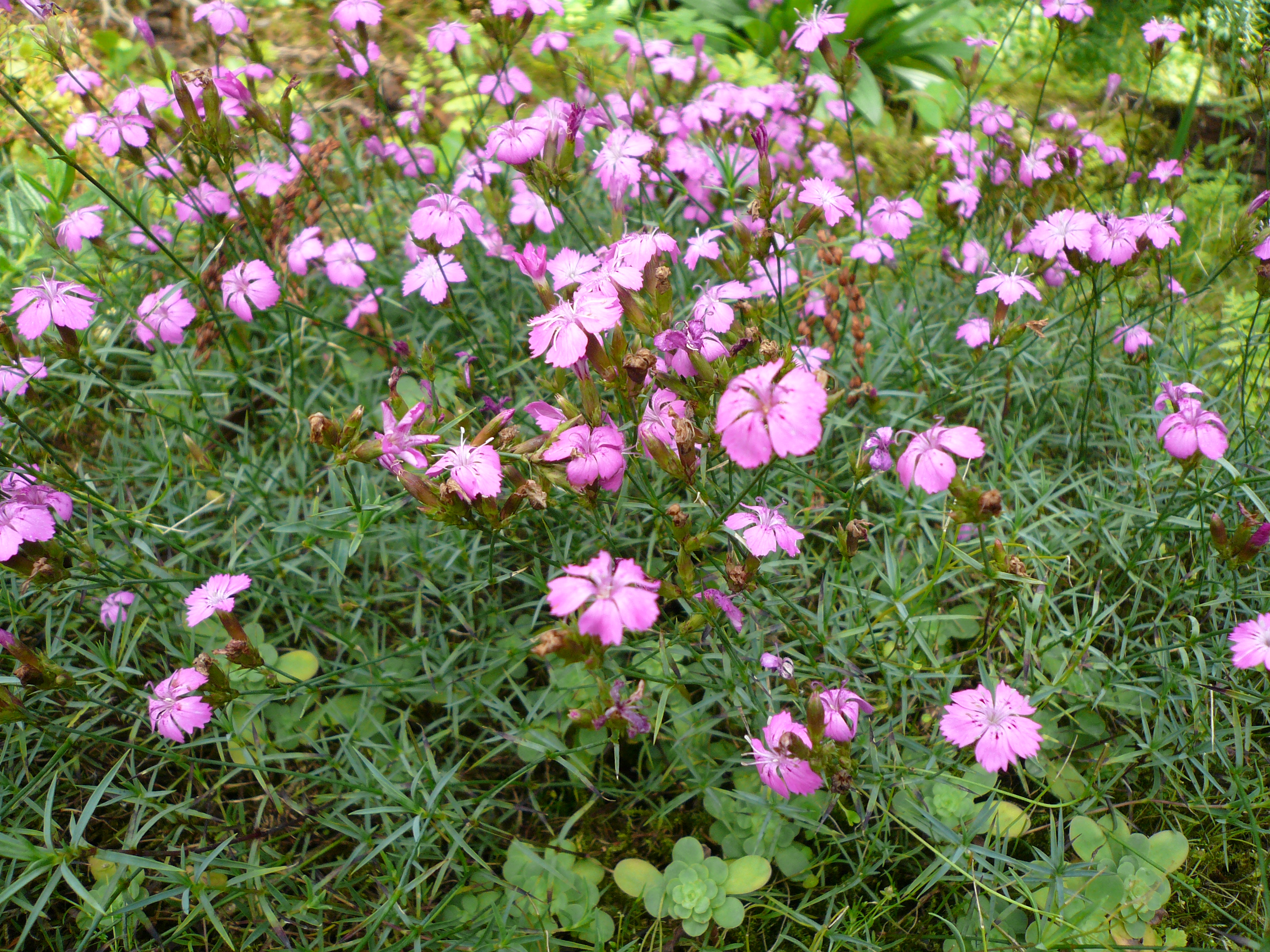 Dianthus graniticus dans mon jardin